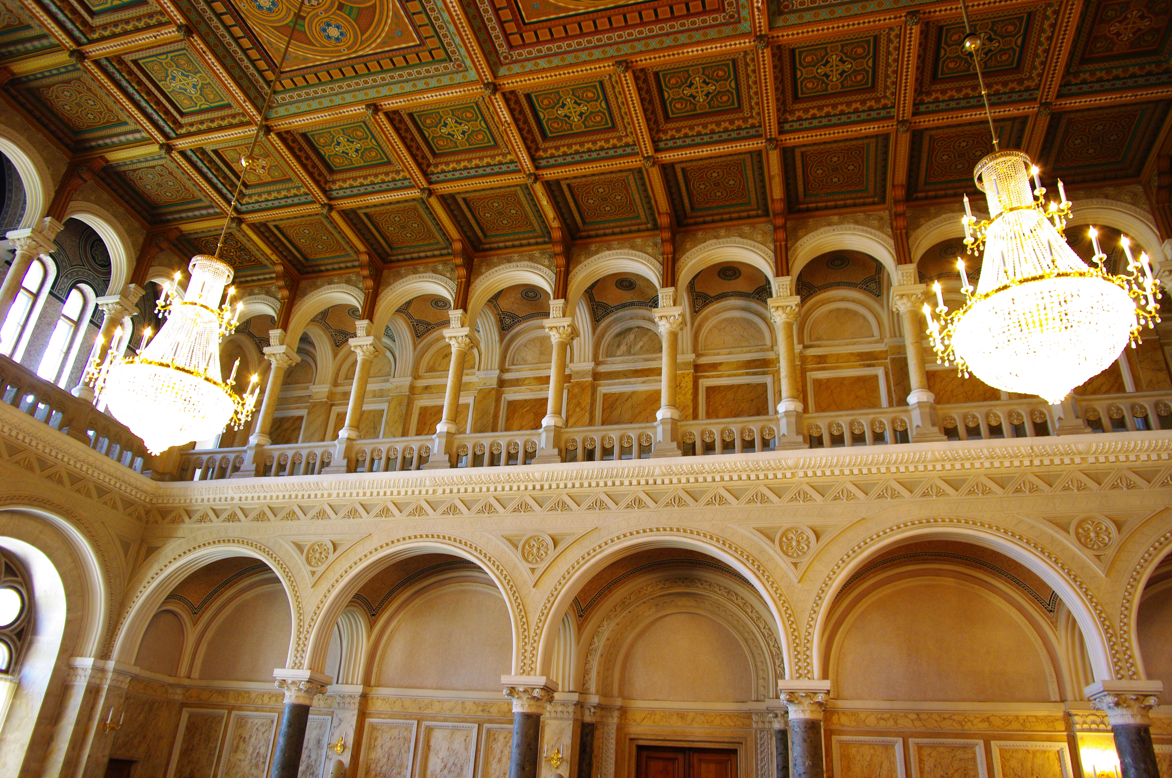 Корпус митрополита (мур.), Чернівці, вул. Коцюбинського, 2